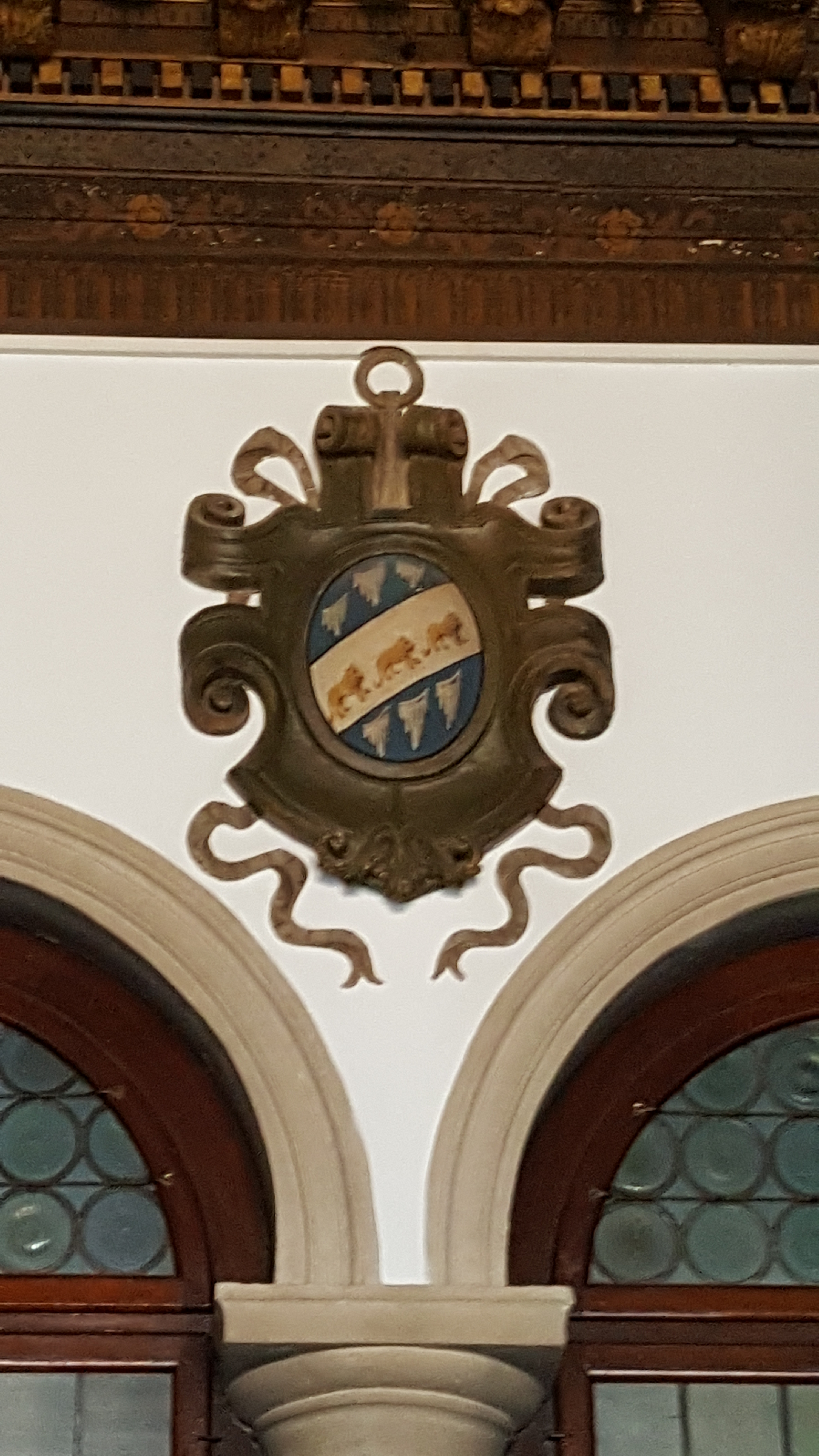 Großer Saal im Primo Piano Nobile: Wappen der Barbarigo